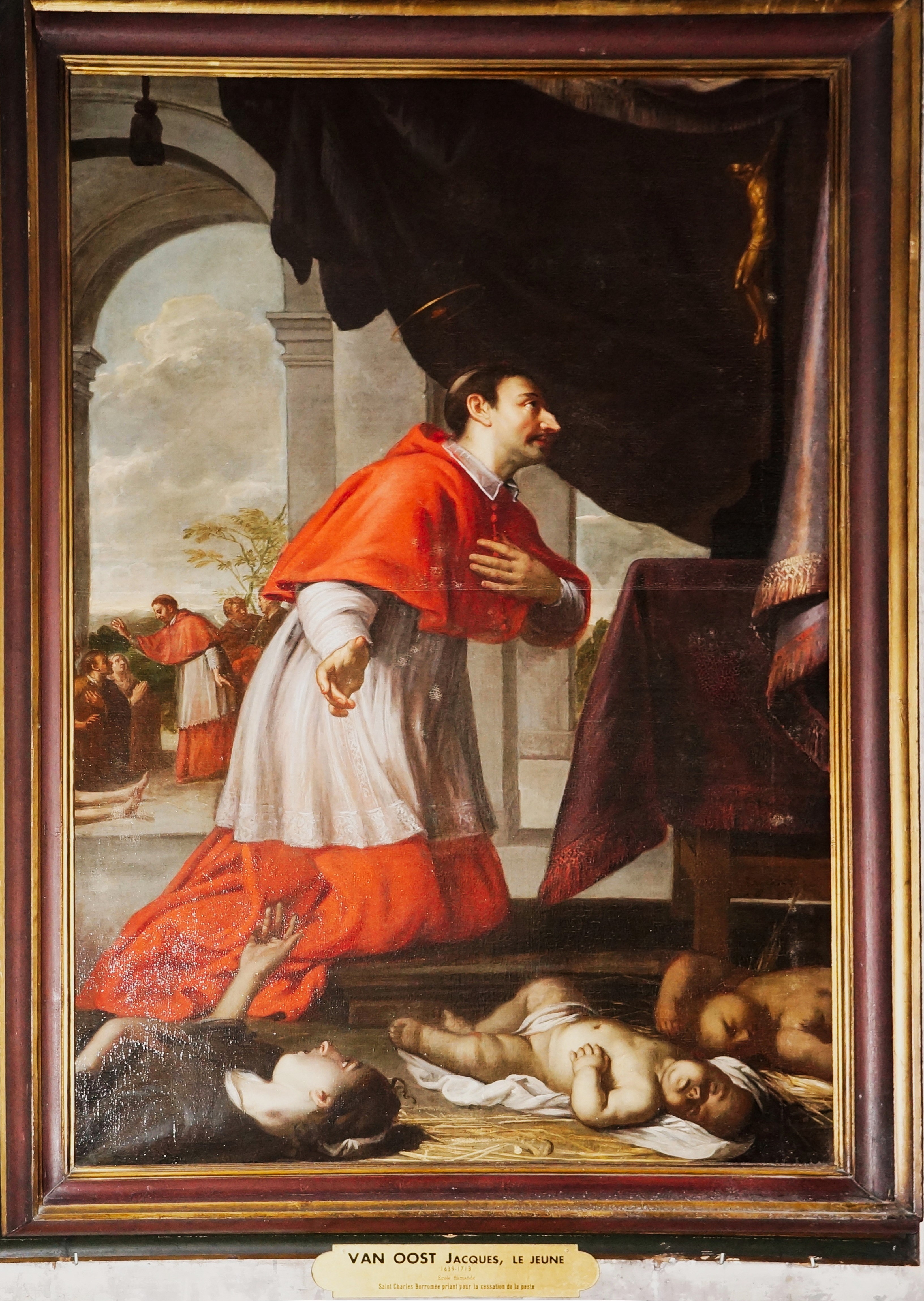 Saint Charles Borromée priant pour les malades de la pestetitle QS:P1476,fr:"Saint Charles Borromée priant pour les malades de la peste" label QS:Lfr,"Saint Charles Borromée priant pour les malades de la peste" Alternative title(s)